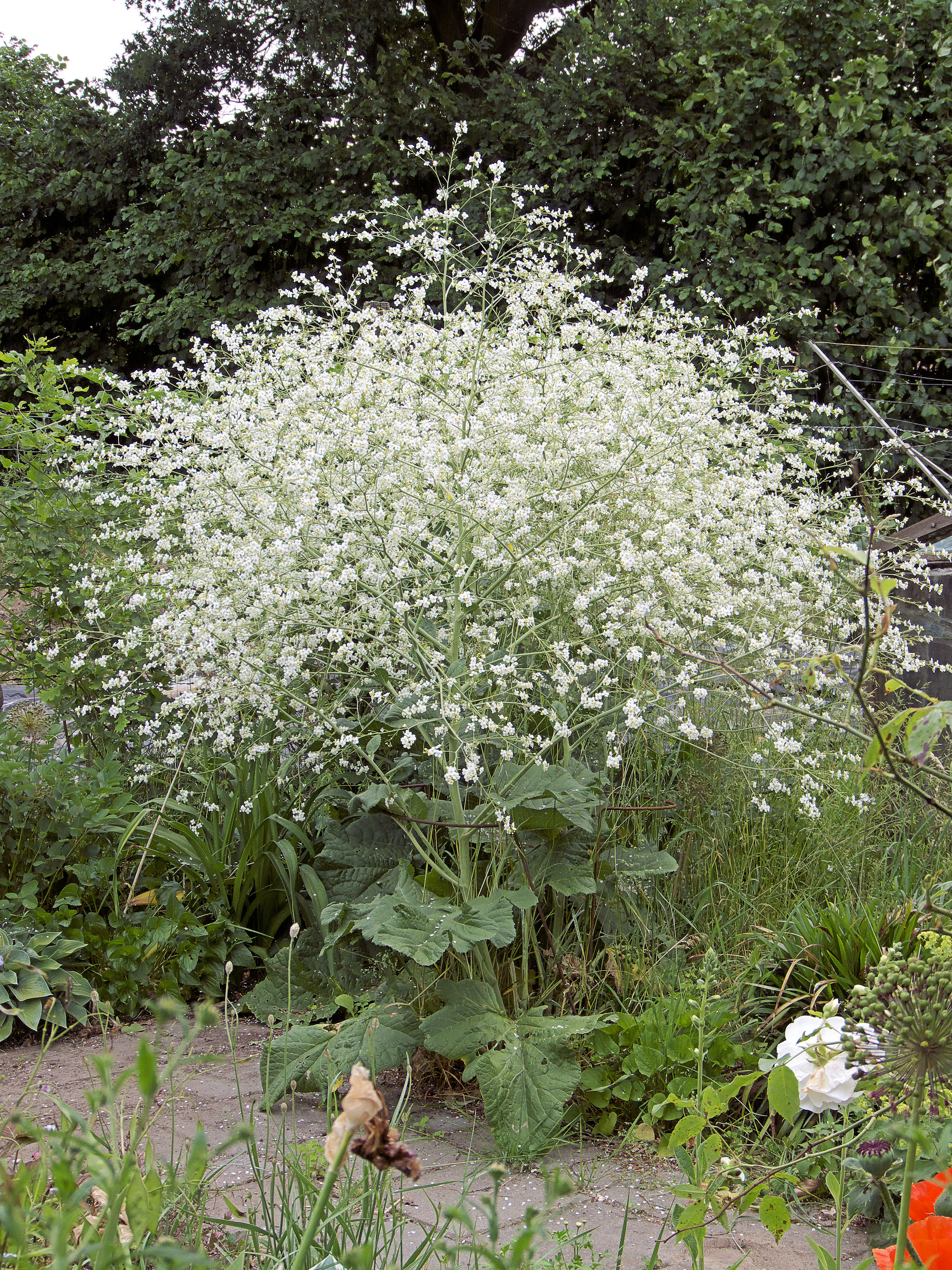 Crambe cordifolia